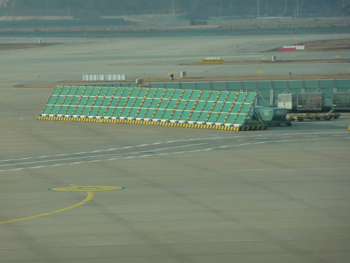 Газоотбойник в аэропорту Сеула, 2015-01-30